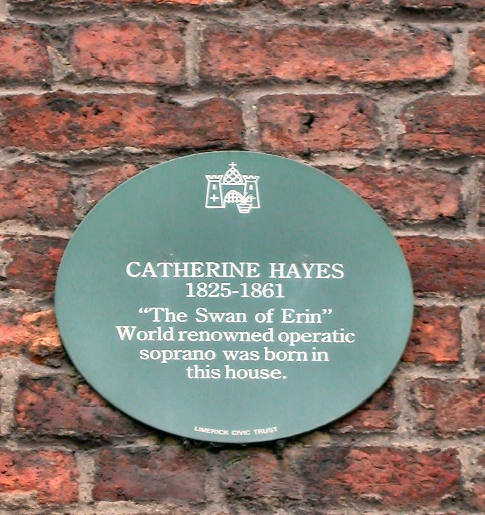 Uimh 4 Sr, Phadraig, Luimneach inar rugadh Caitriona Ni hAodha